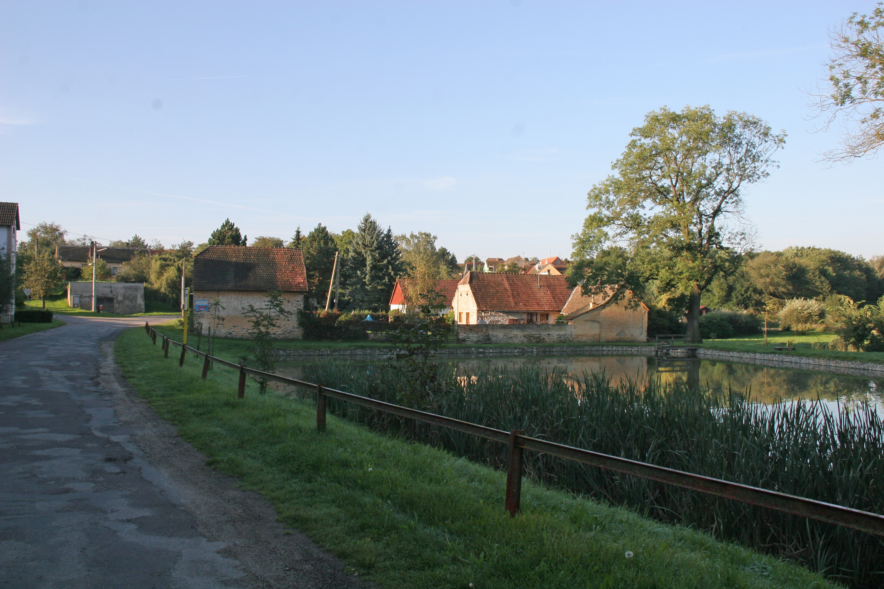 Lukov rybník